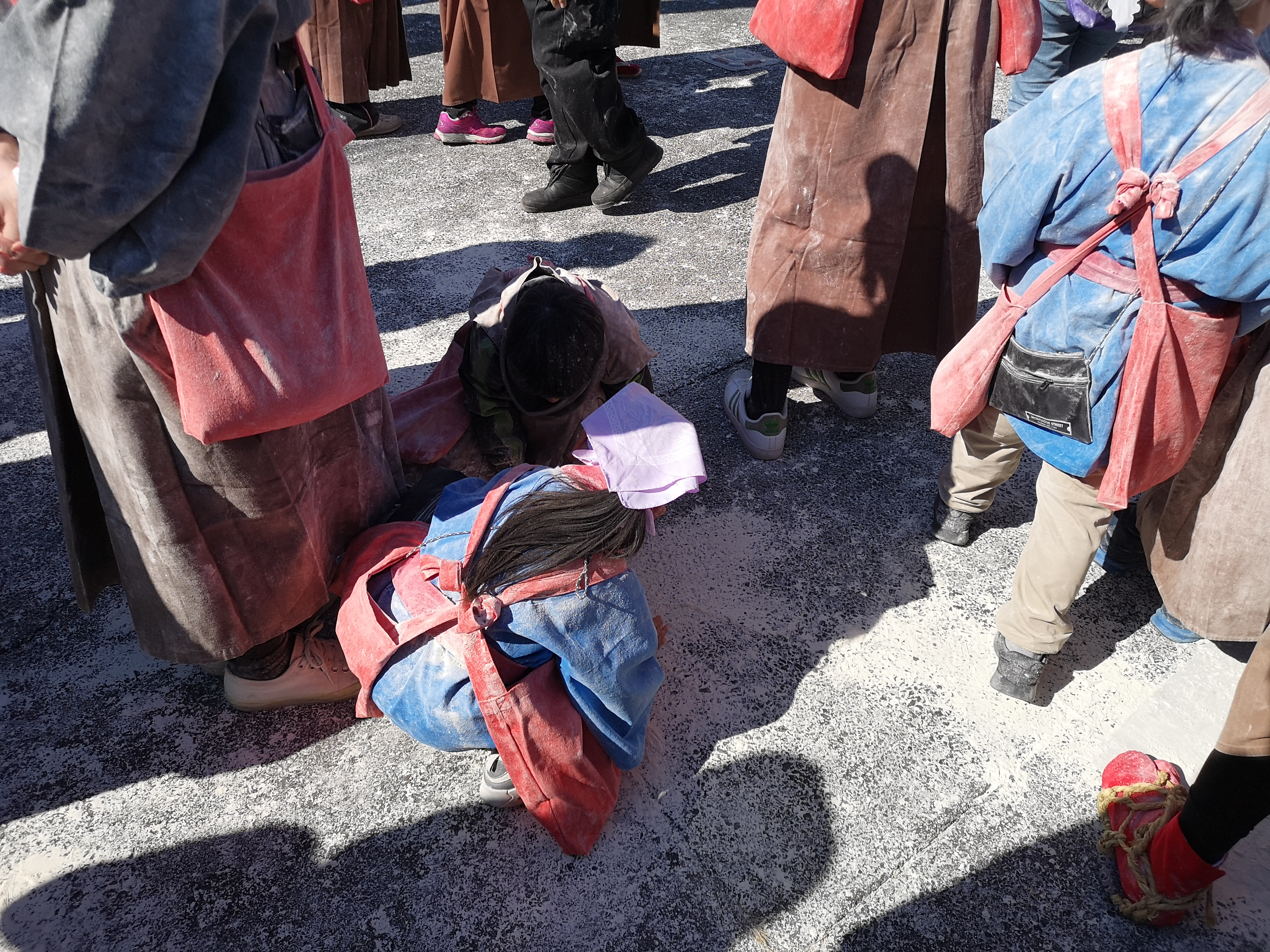 豊橋鬼祭 門寄りの人々